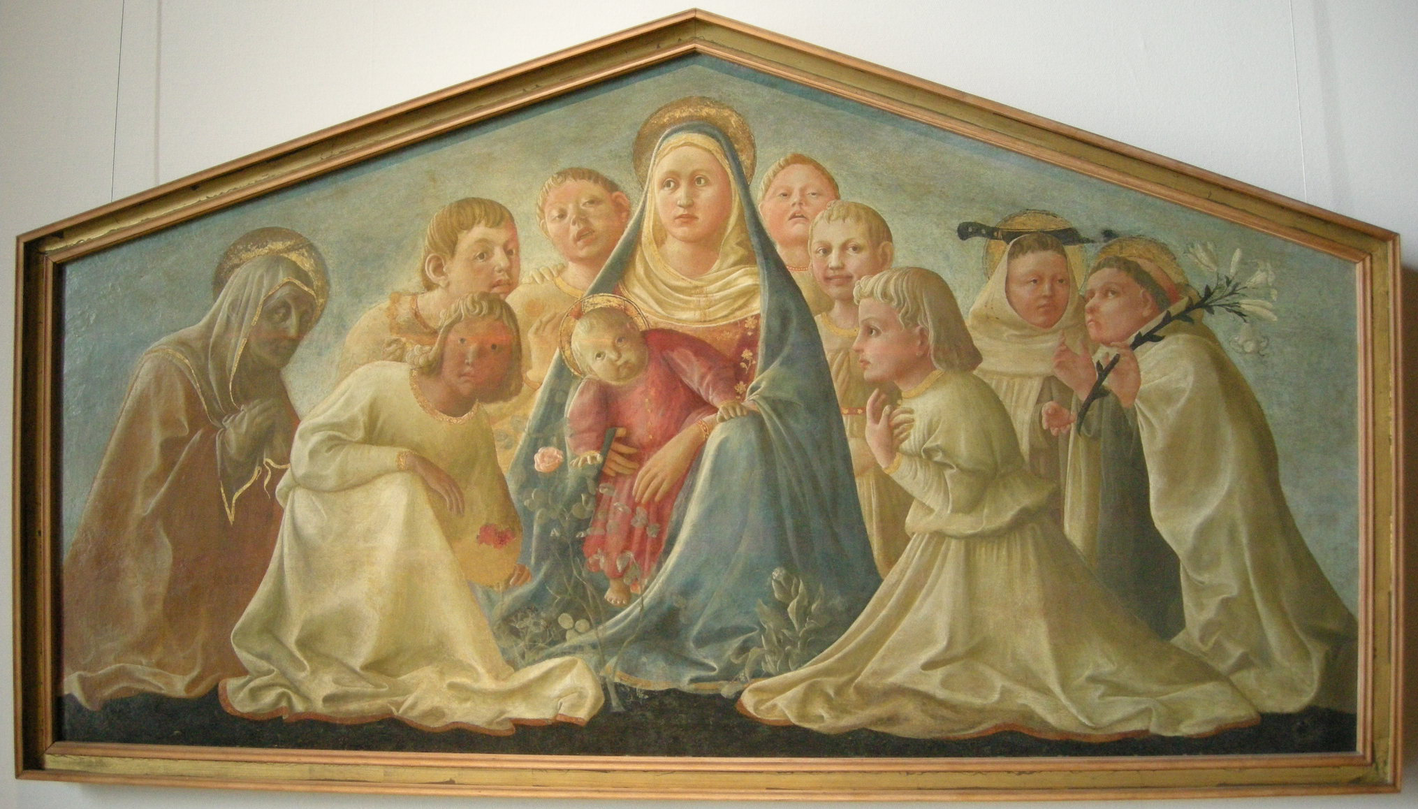 La Madonna col bambino è circondata a esedra da sei angeli "apteri" (senza ali) e privi di aureola, oltre a tre santi carmelitani: a sinistra Angela di Boemia e a destra Angelo di Gerusalemme (con il coltello in testa) e Alberto da Trapani (con il giglio).